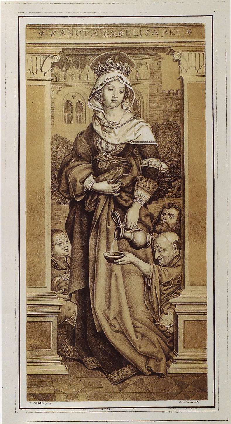 Ferdinand Piloty: Die Hl. Elisabeth von Hans Holbein d. Ä., Kreidelithographie/Tonplatten. Blatt 10 aus: Johann Christian von Mannlich: Königlich baierischer Gemäldesaal zu München und Schleissheim. 2 Bände. München, 1817/1821.